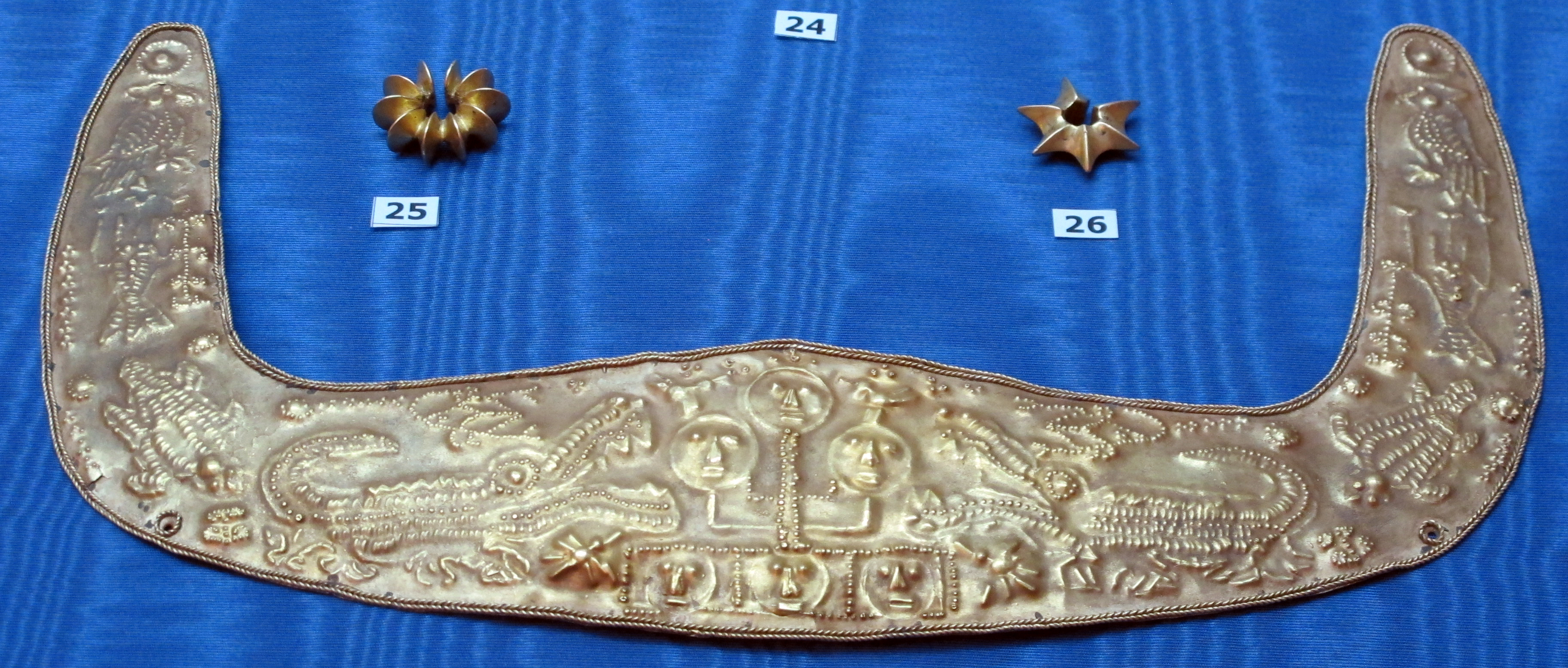 Isola di sumba, frontale lamba, xix-xx sec., due orecchini da giava c.le, IV-VII sec